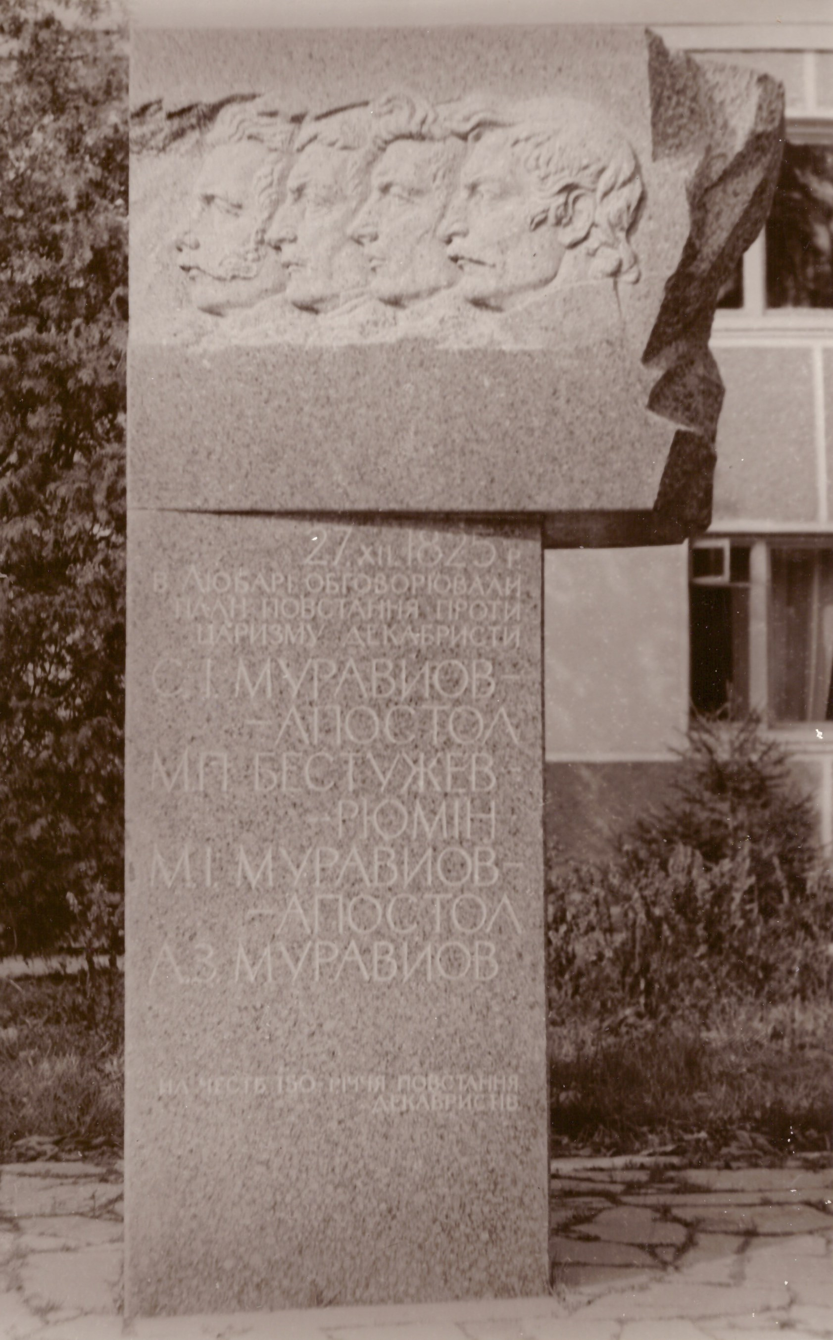 Пам’ятник на честь 150-річчя повстання декабристів. М. Любар Любарський район Житомирська область. 1983. Скульптор Таранченко В.О., архітектор Марчук М.Г. Граніт.